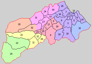 青森県三戸郡の町村。